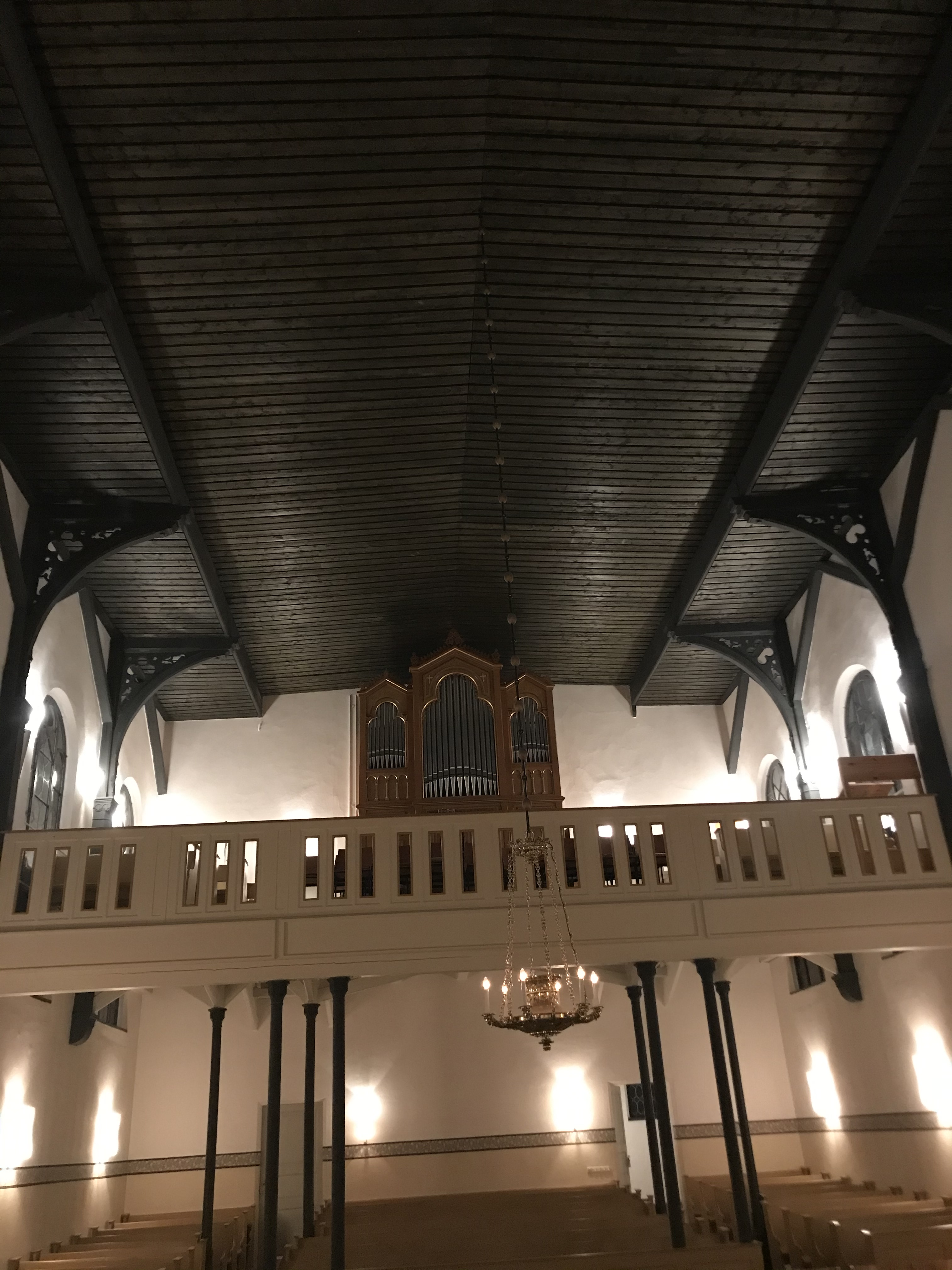 Eine Holzdecke, welche sich über das gesamte Schiff zieht.